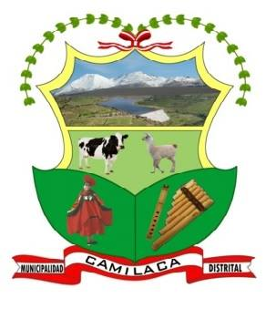 Escudo oficial del Distrito de Camilaca. Donde se ve representado el celoso guardián de Camilaca; Volcán Tutupaca, la represa curraljawira, la ganadería de camilaca, nuestro anaco y nuestros instrumentos que representa la magnífica y originarias danzas típicas de camilaca y sus costumbres.